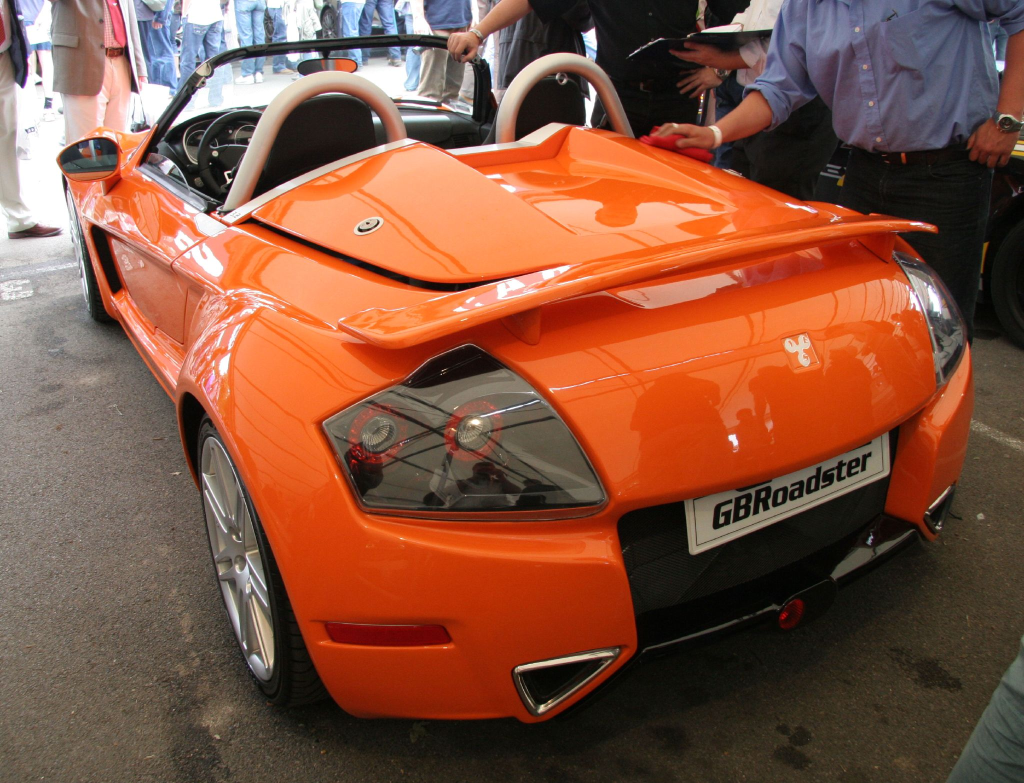 YES GB Roadster.